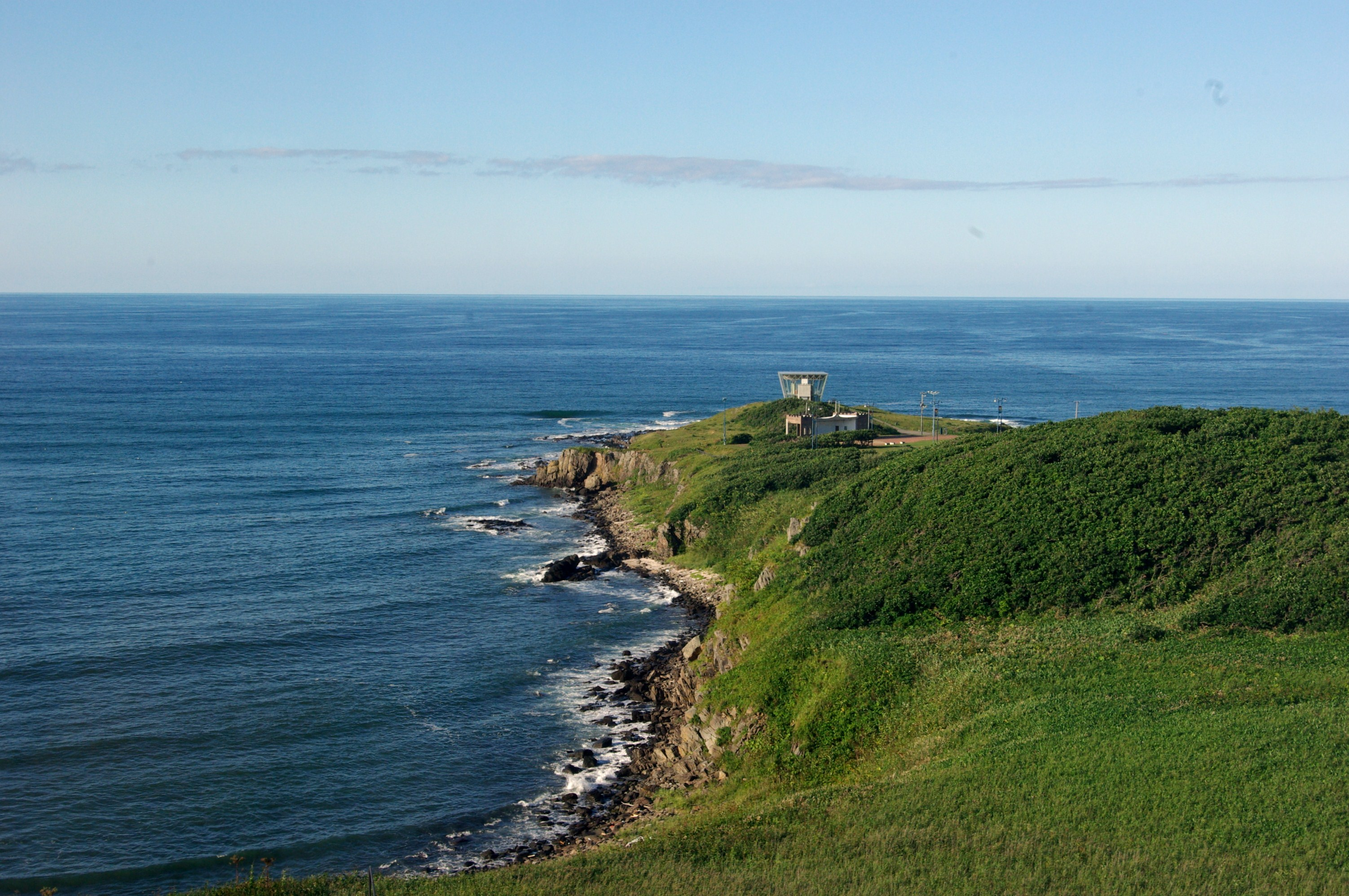 雄武町日の出岬